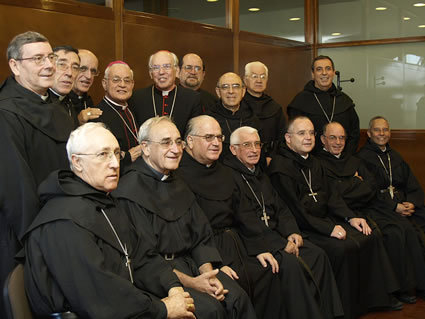 Obispos Agustinos Recoletos